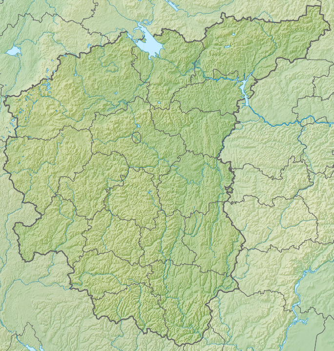 Россия, Центральный федеральный округ, физическая карта. Координаты для GMT: -R30.60/47.80/49.40/59.80 Инструменты: GMT, Inkscape